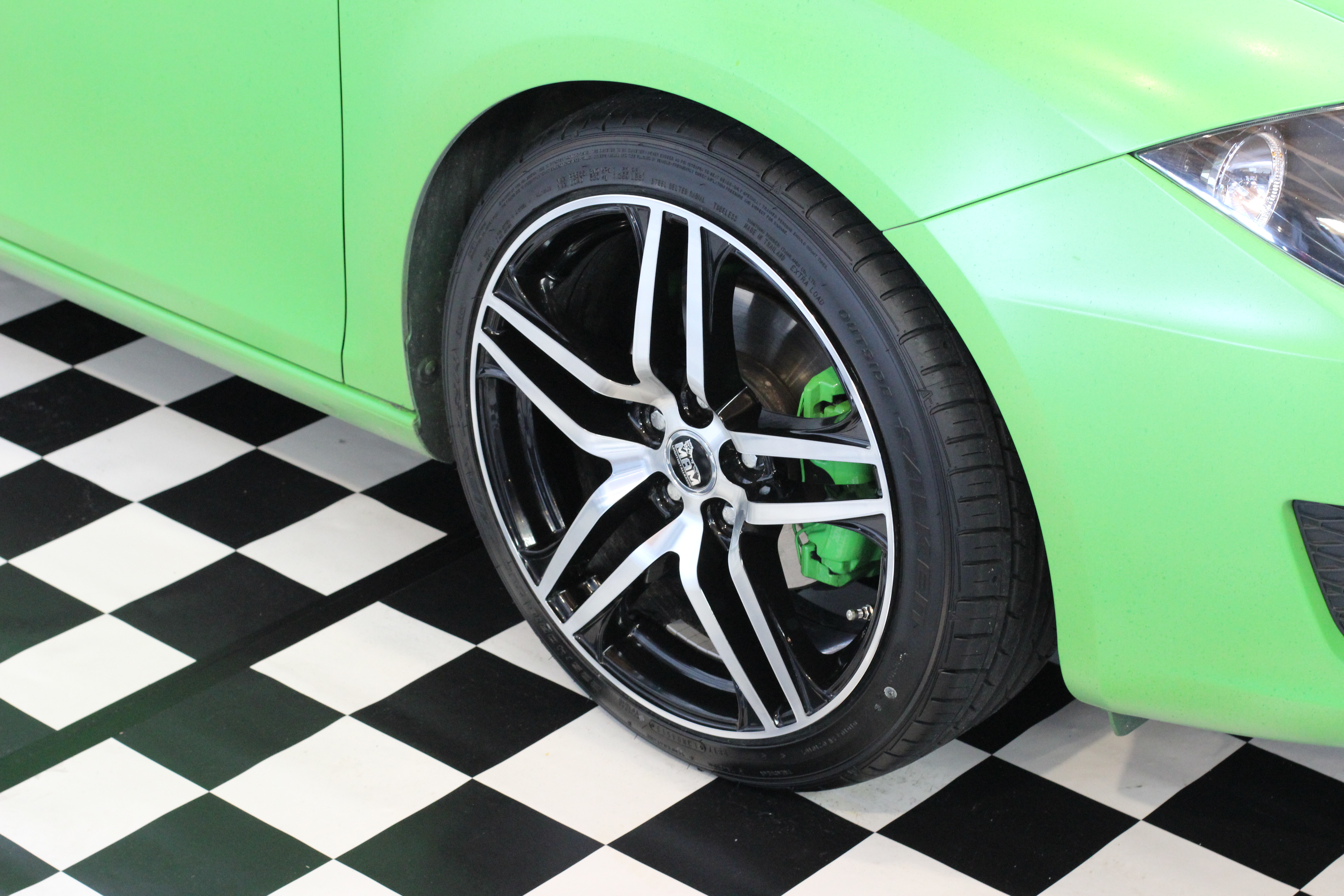 Leichtmetallfelge von MAM auf der Tuning World Bodensee 2014